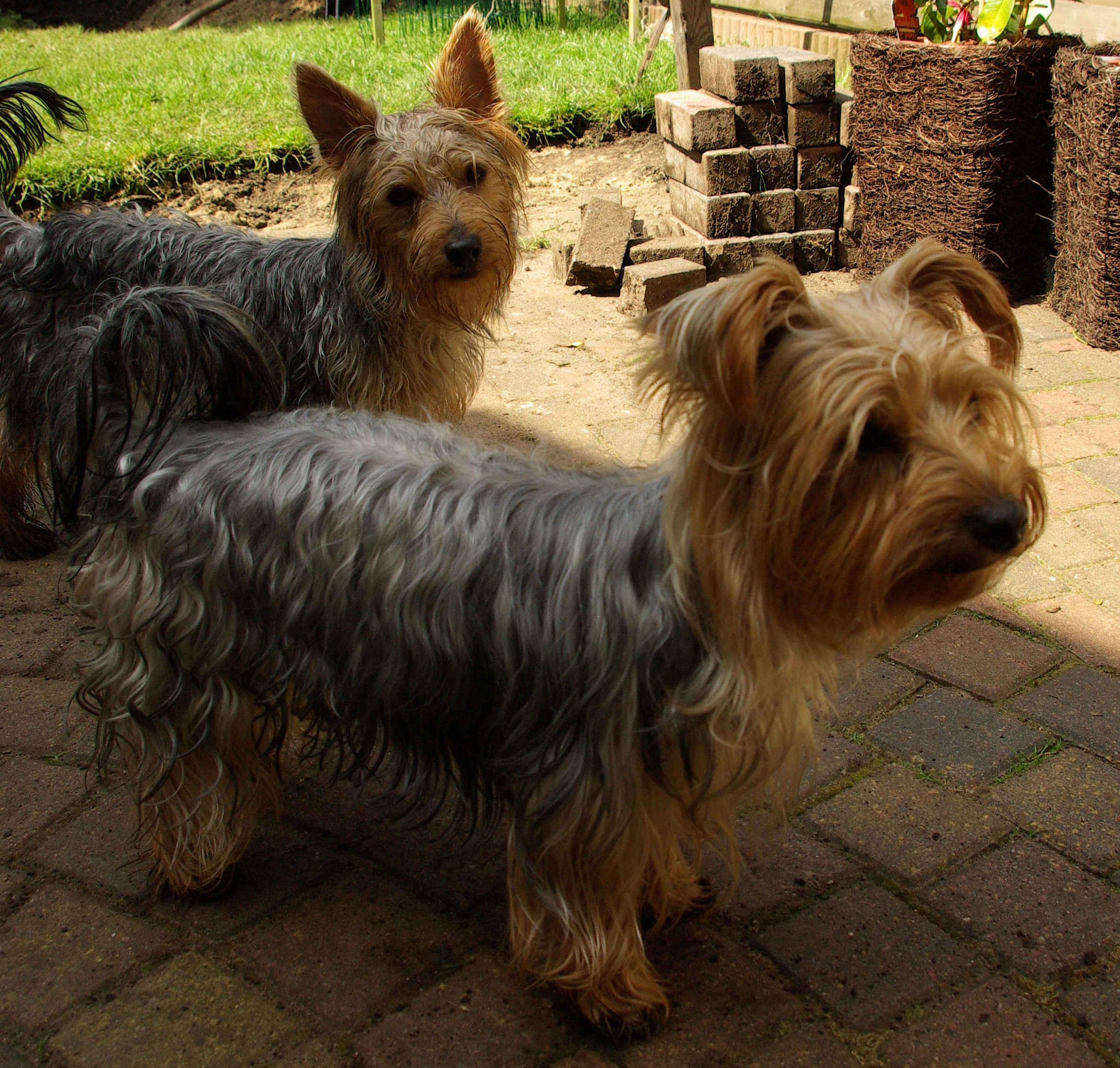 Yorkshire terrie